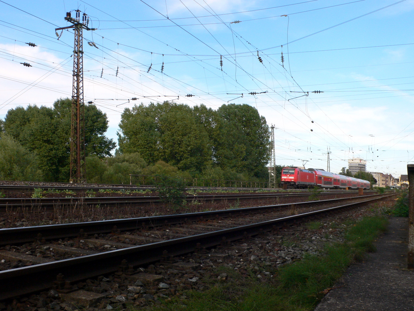 Siebenbogenbrücke in Fürth, Blick von Westen auf die Gleisanlagen mit anfahrendem Regional-Express Richtung Bamberg